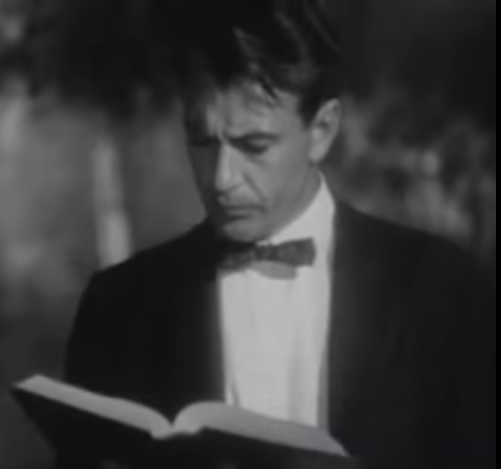 映画「教授と美女」のオリジナル予告編よりゲイリー・クーパー演じるポッツ教授